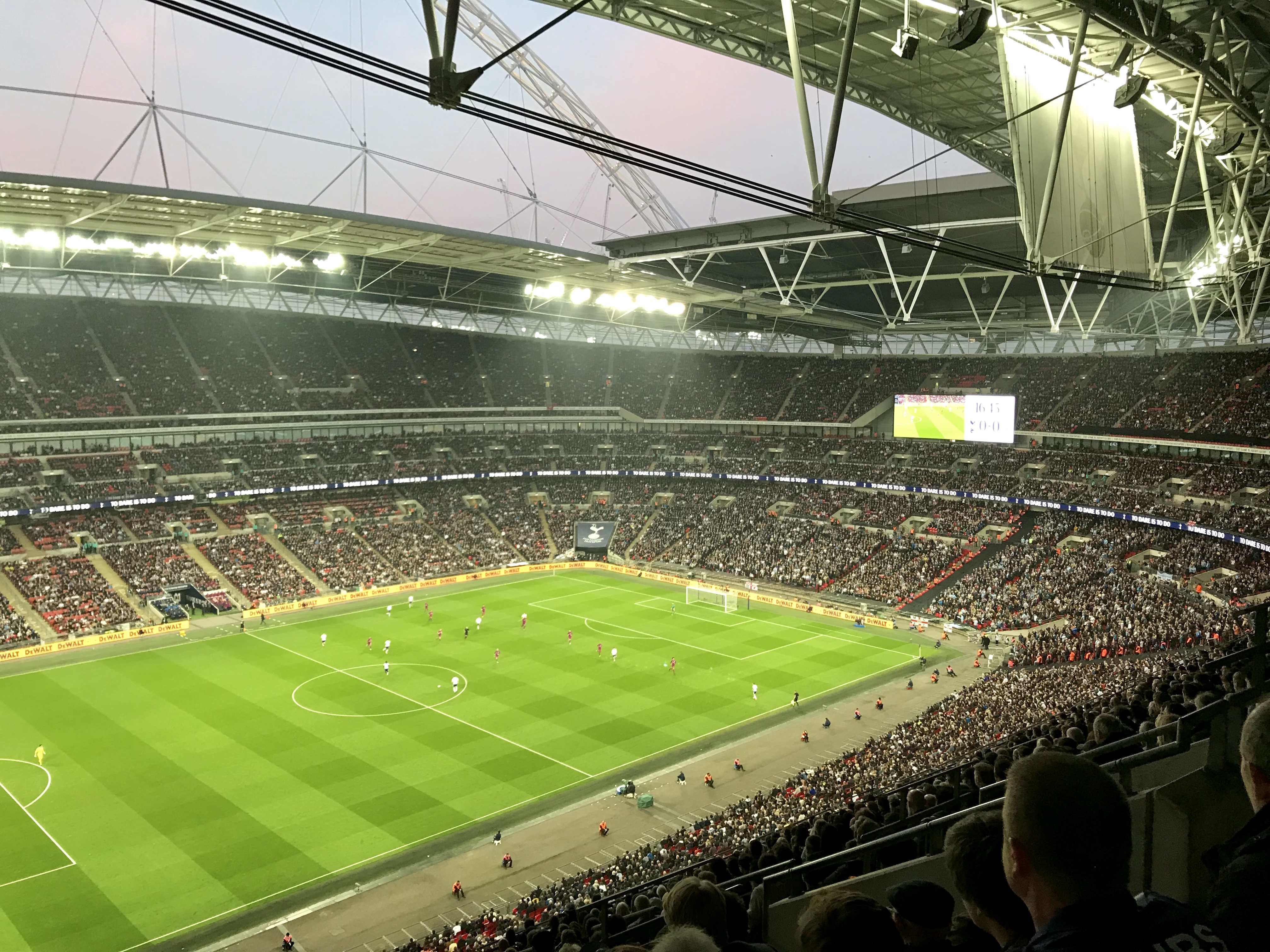 Wembley Stadium, Wembley, Iso-Britannia, huhtikuuta 2018